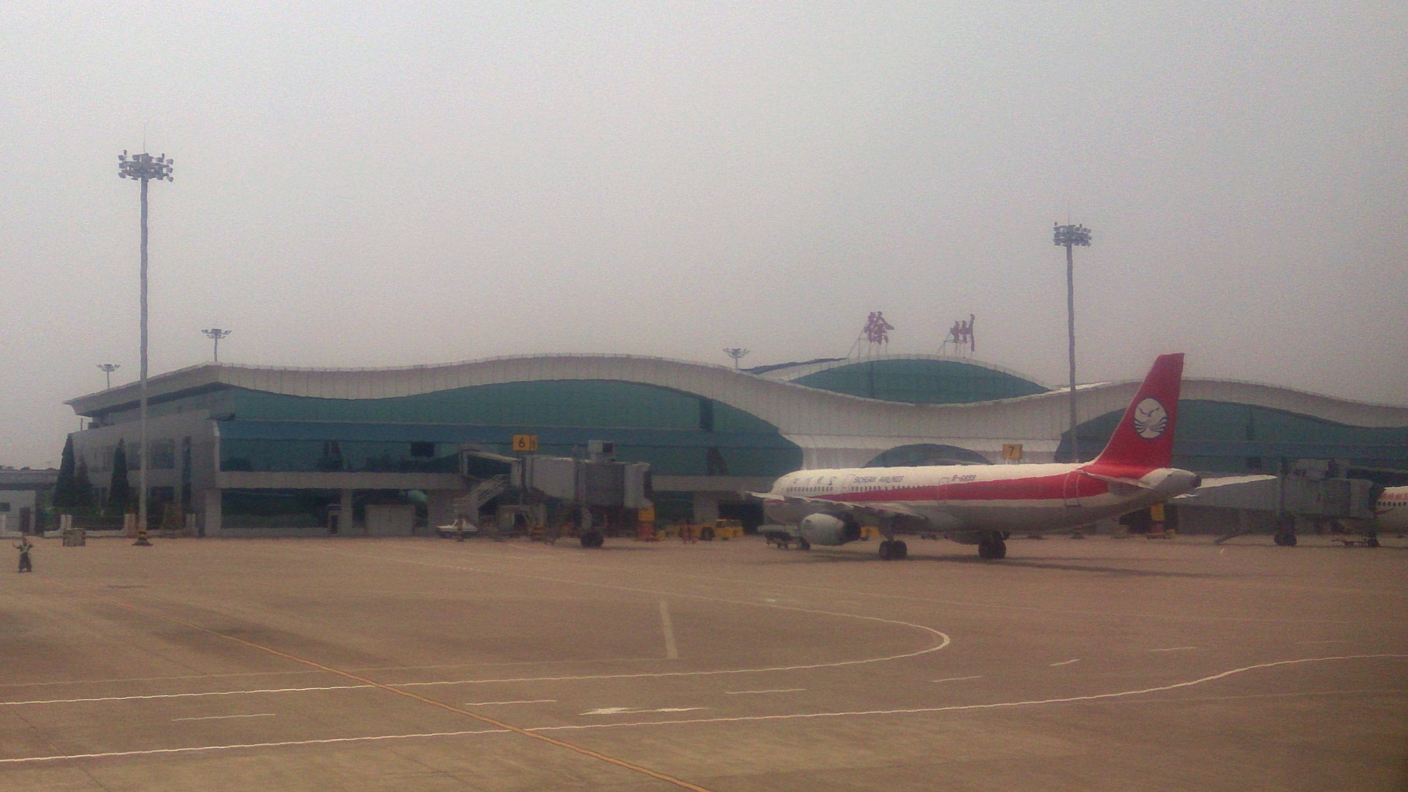 徐州观音机场 - Xuzhou Guanyin Airport - 2015.06